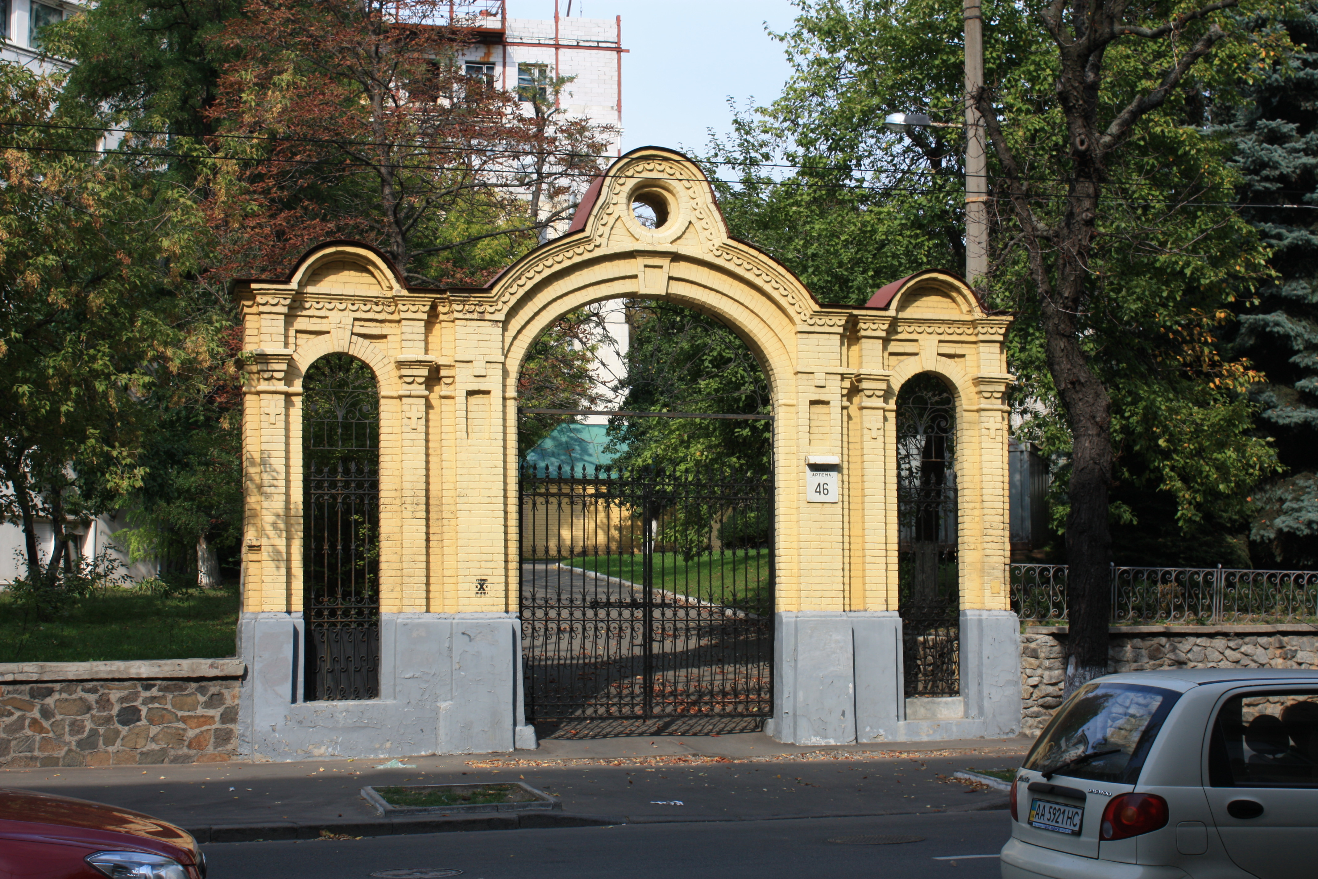 Київ, вул. Артема, 46. Брама вхідна